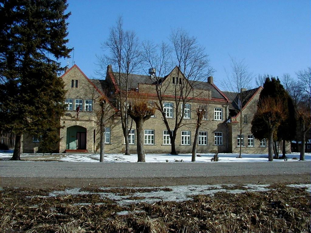 Kalnciema vidusskola 2003-03-08